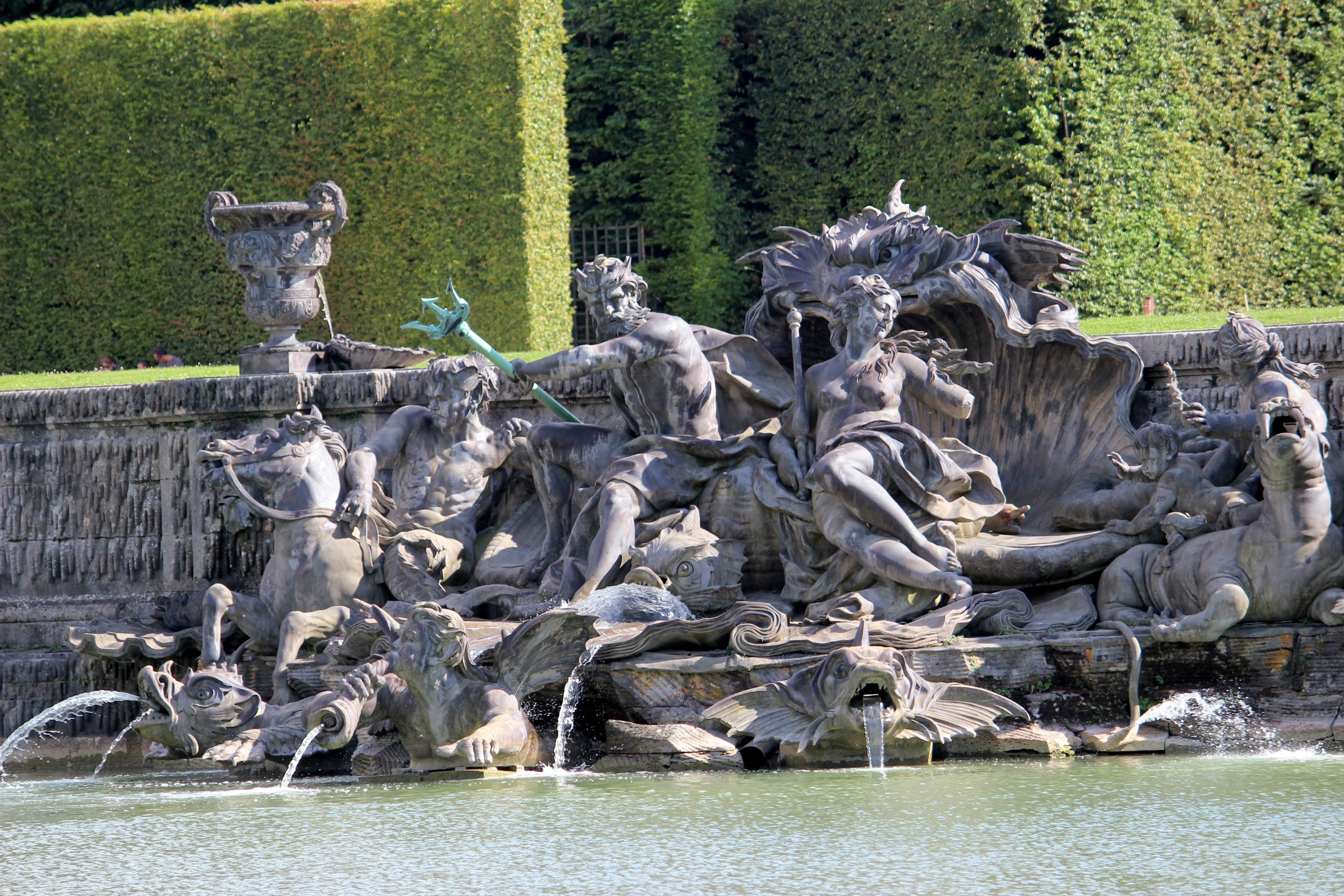 Versalles. Jardín del palacio real. Fuente de Neptuno